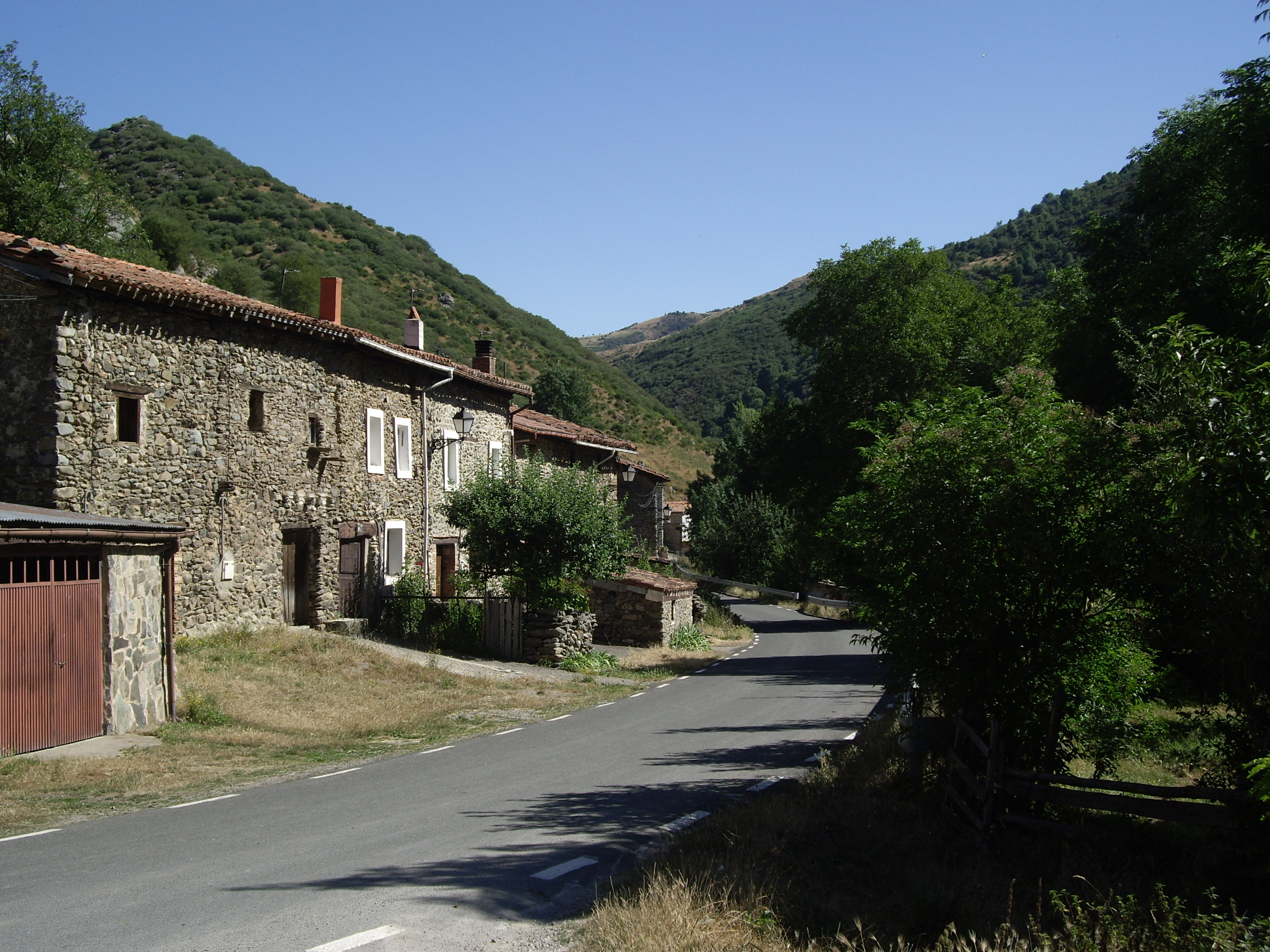 Posadas, aldea de Ezcaray